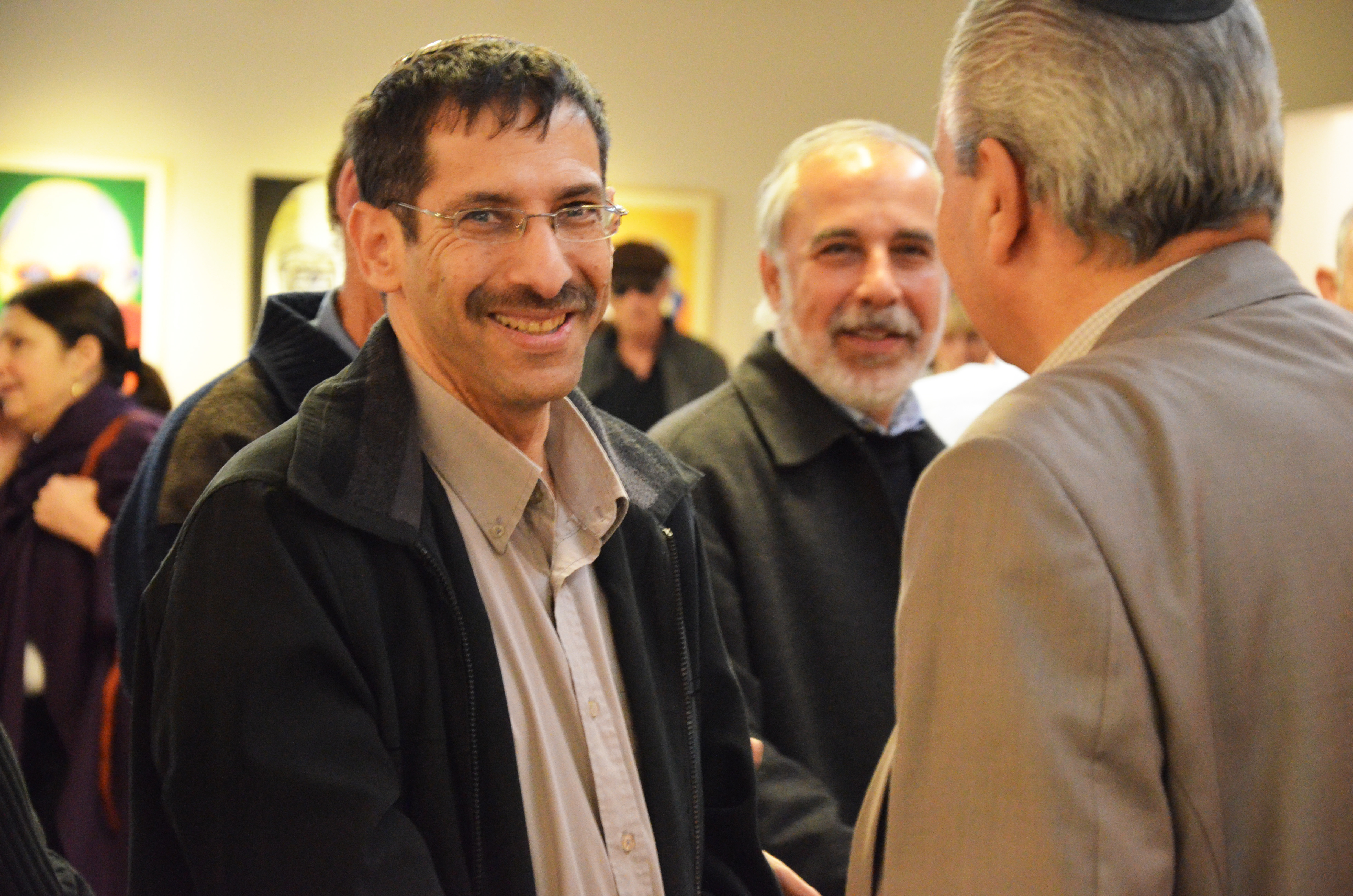 צילום: טל סולומון ורדי